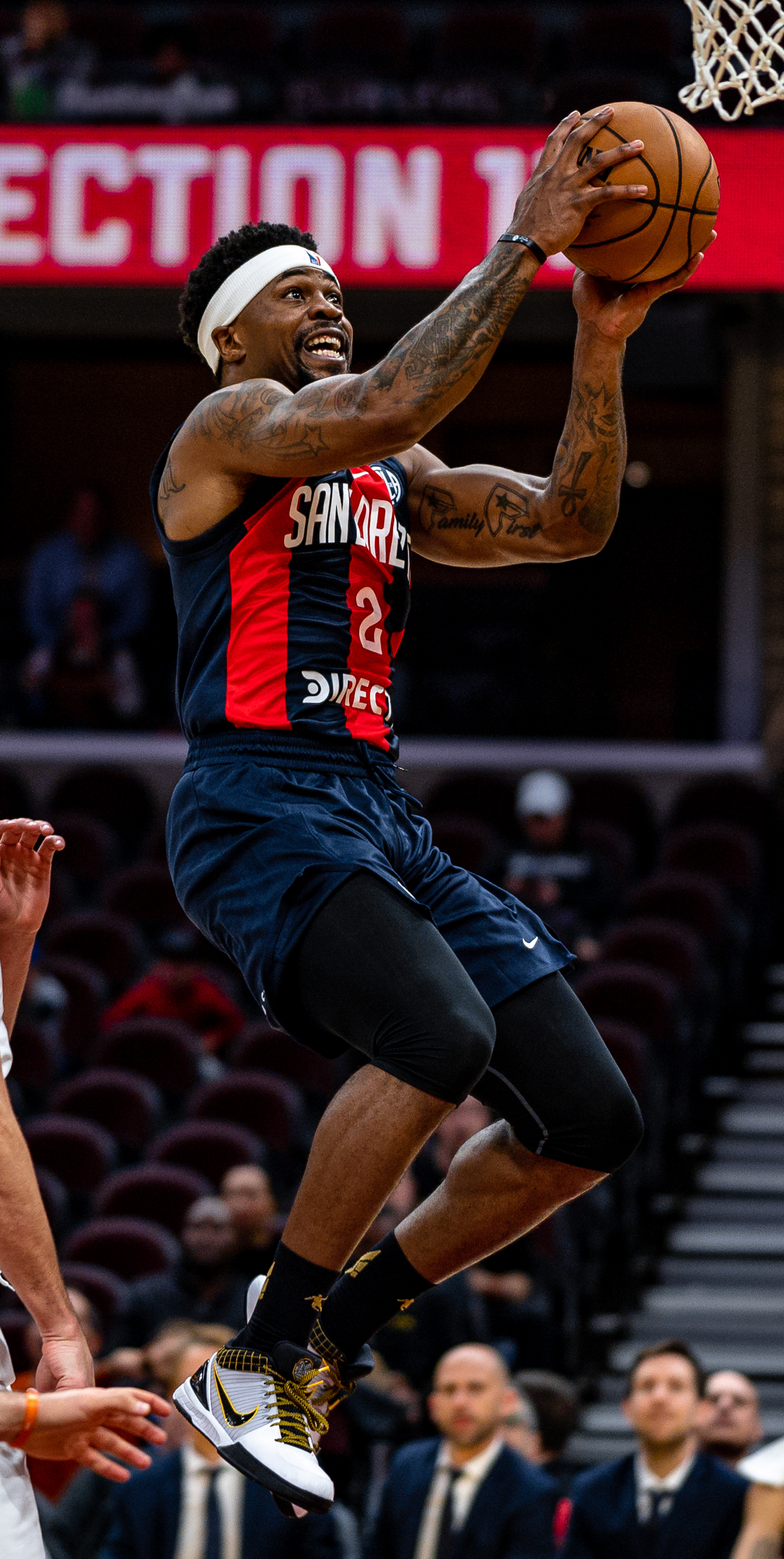 Cleveland Cavaliers vs. San Lorenzo